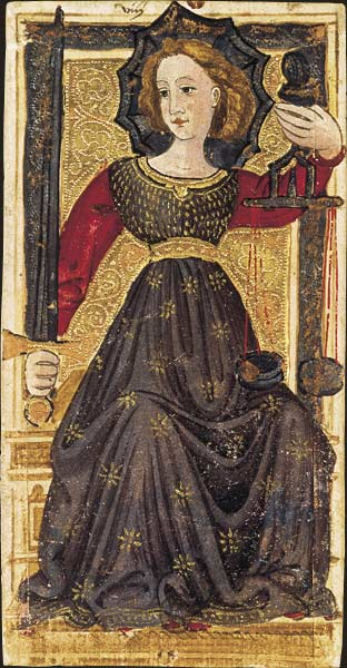 Charles VI (or Gringonneur) Deck; Le tarot dit de Charles VI